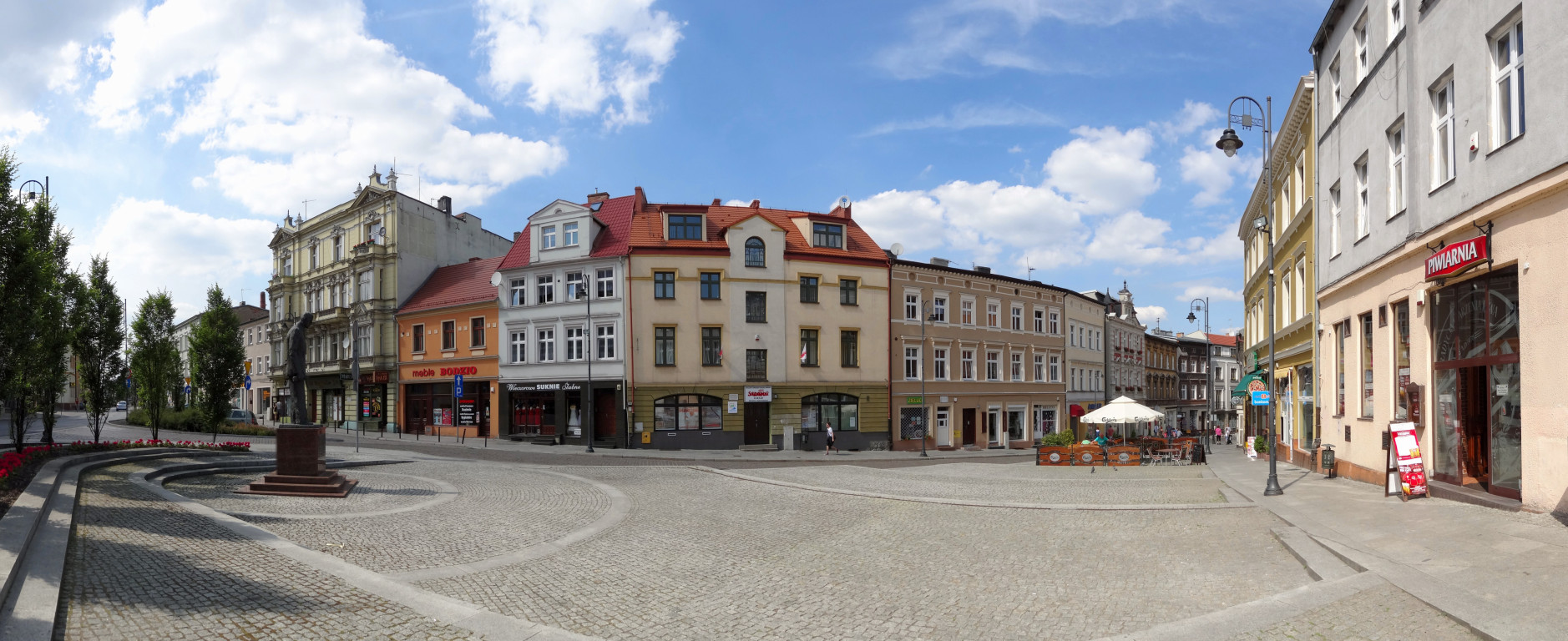 Wełniany Rynek w Bydgoszczy